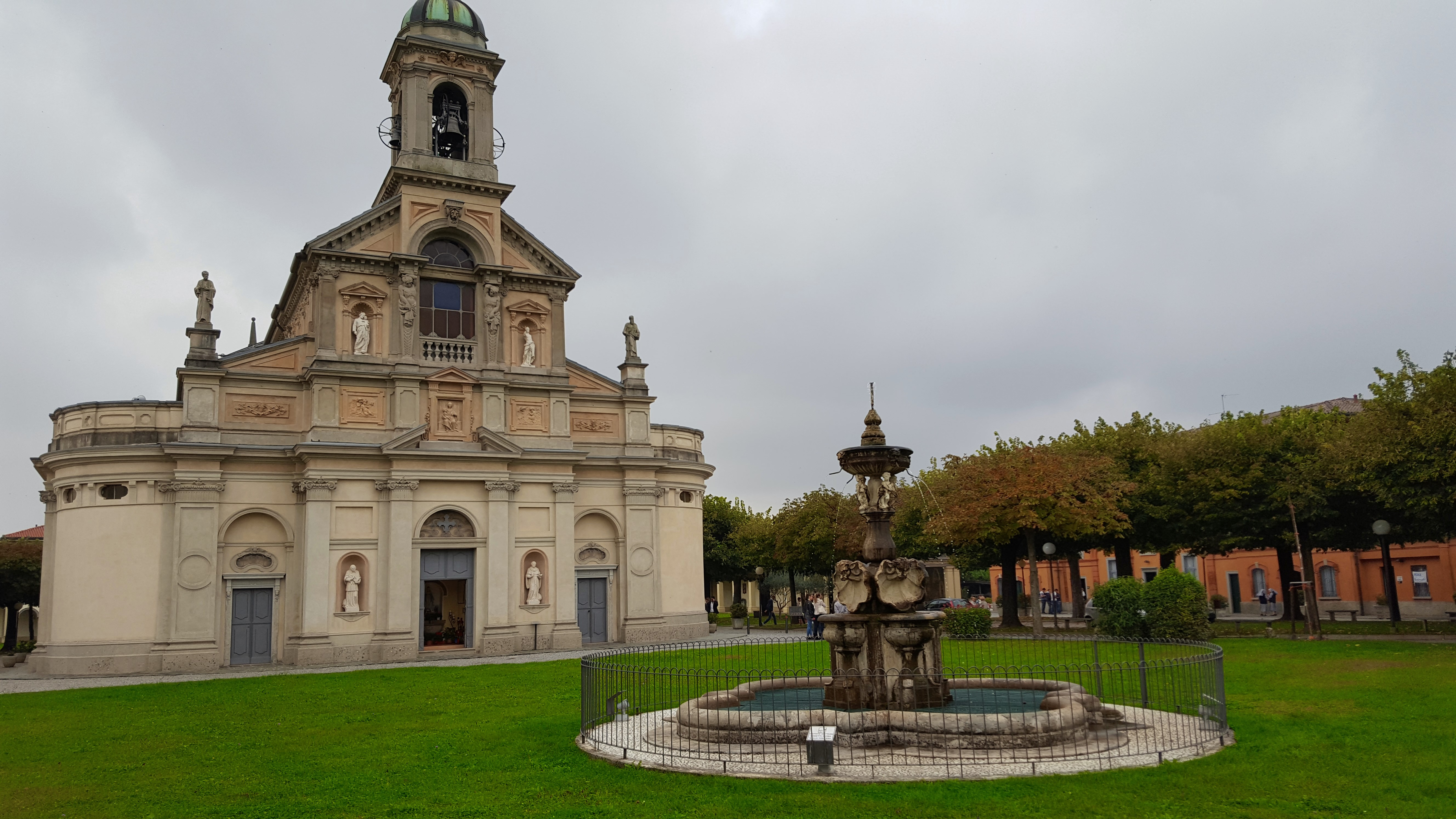 Stezzano - Santuario Madonna dei Campi Stezzano - Santuario Madonna dei Campi